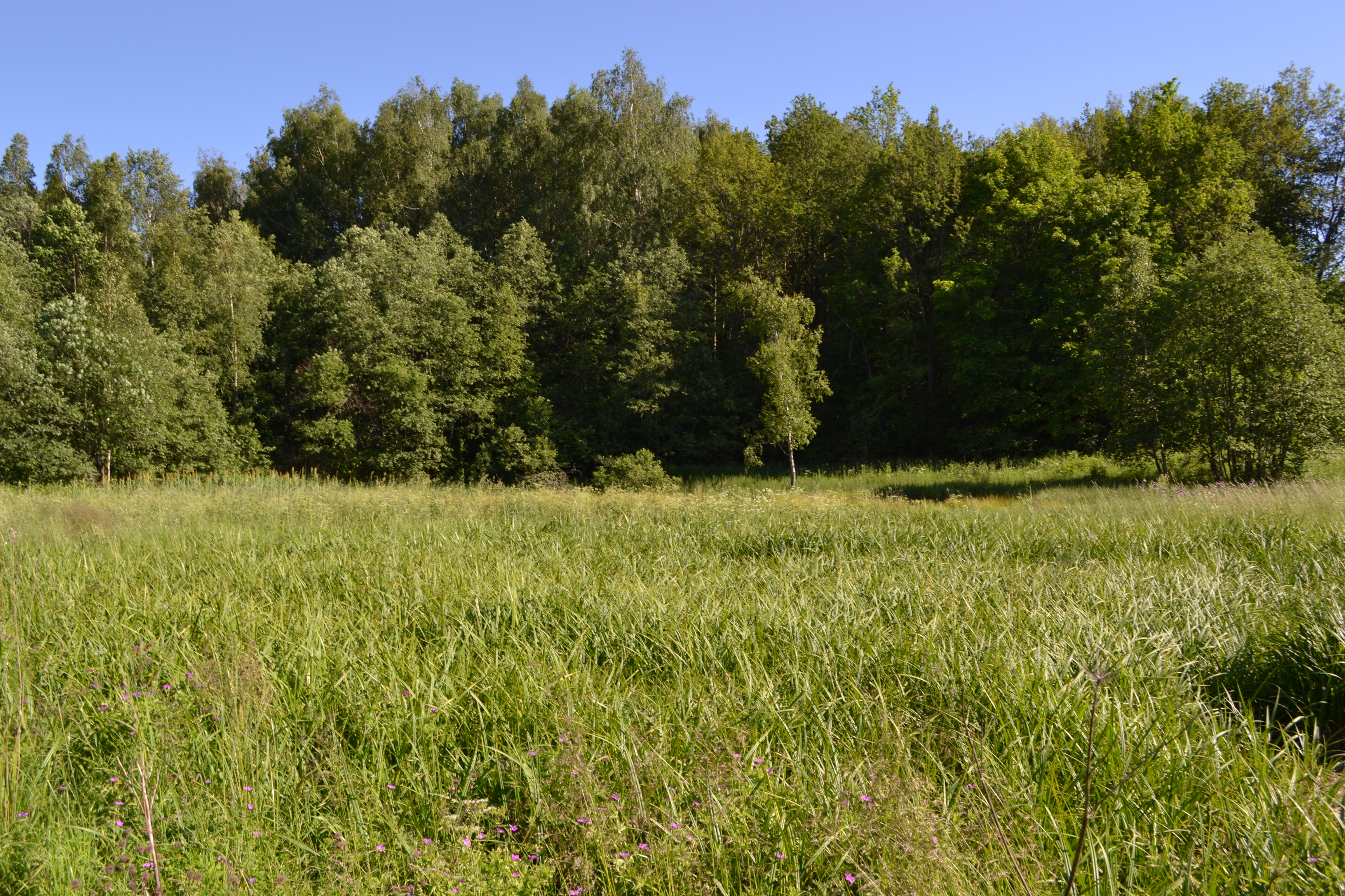 Пустошь Белухинская, находится между селом Радонеж и деревней Рязанцы Сергиев-Посадского района Московской области